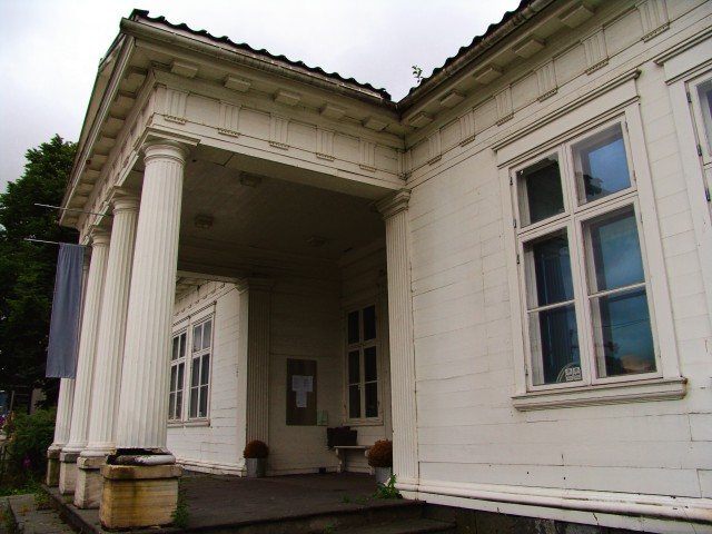 Tempelgavlen på Urdi i Bergen.